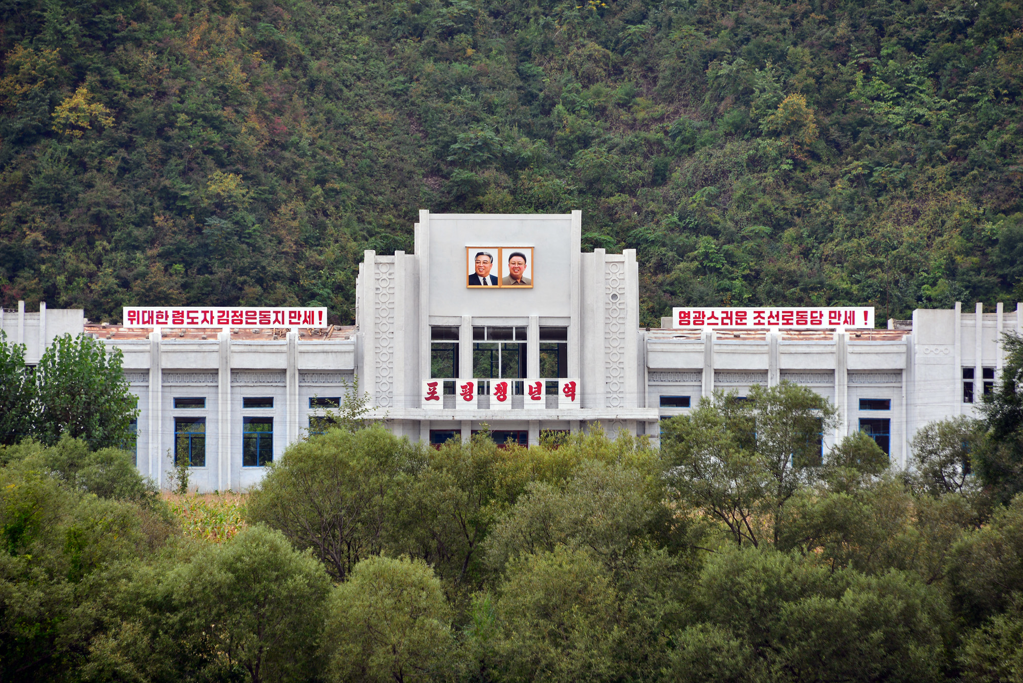 两江道葡坪青年站